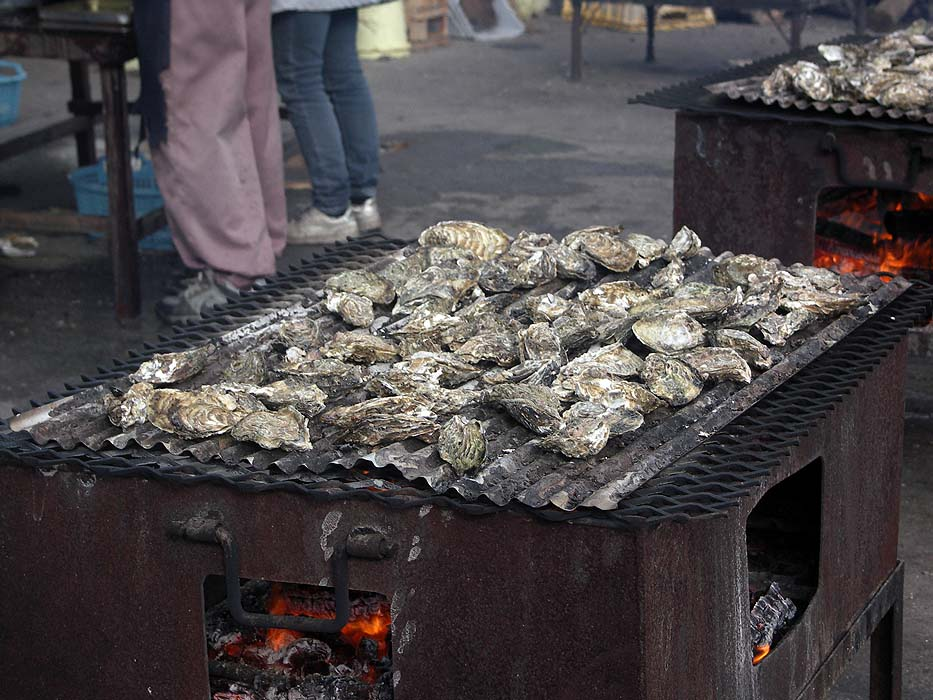 baked oysters. 焼き牡蠣の食べ放題